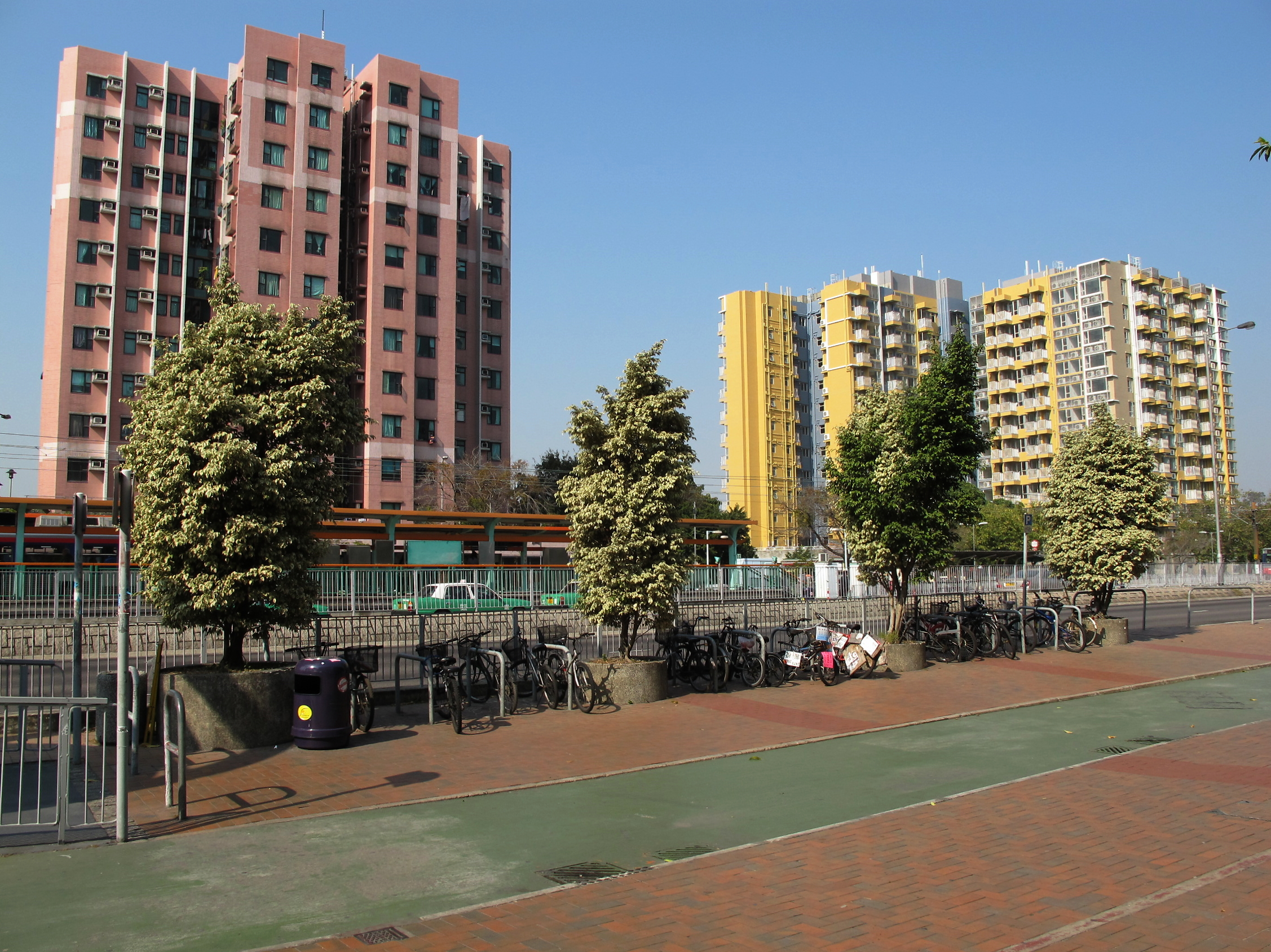 Hung Shui Kiu Residentional